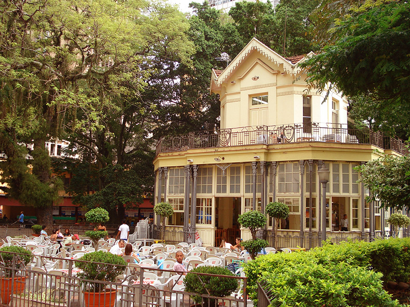 Chalé da Praça XV, tradicional bar e restaurante da cidade de Porto Alegre, Brasil.